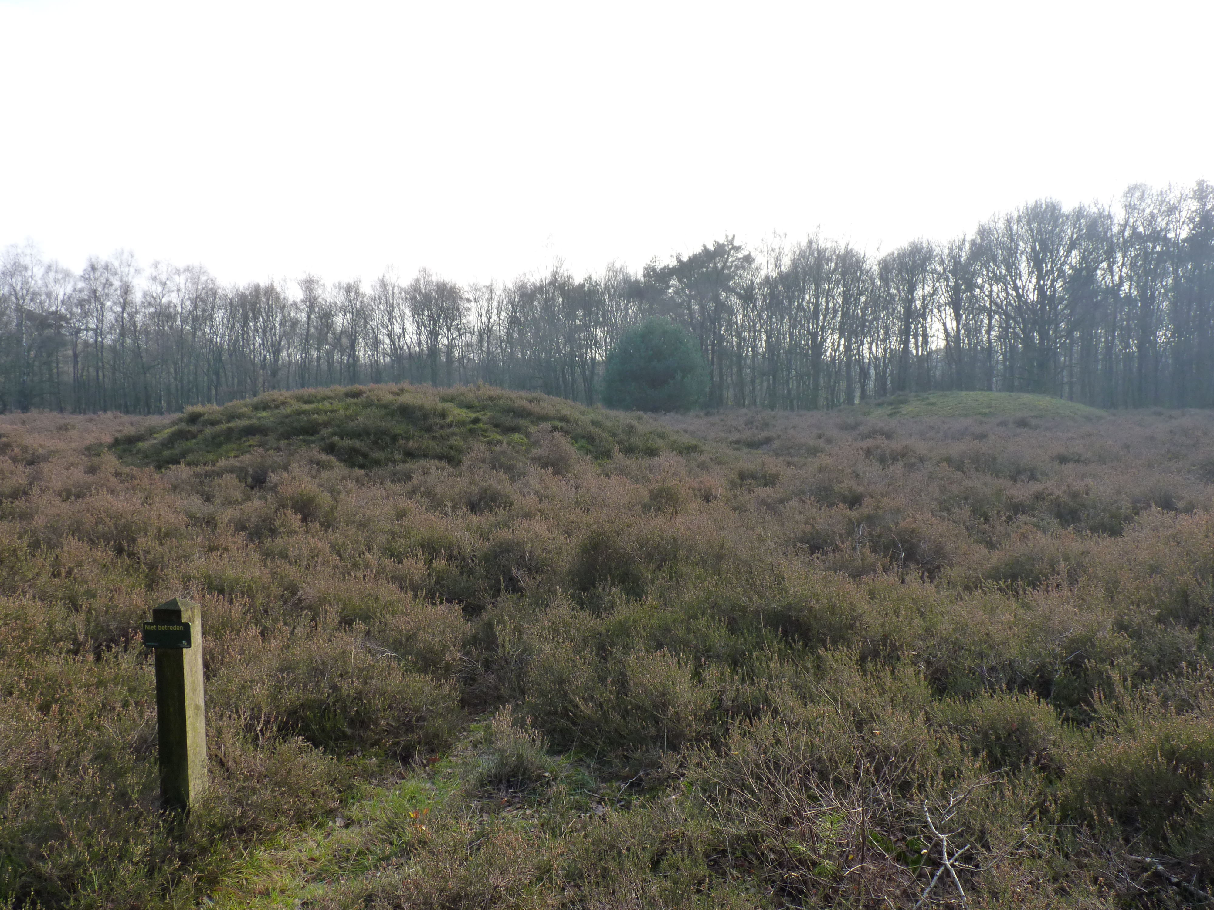 Mander heideveld met 2 grafheuvels